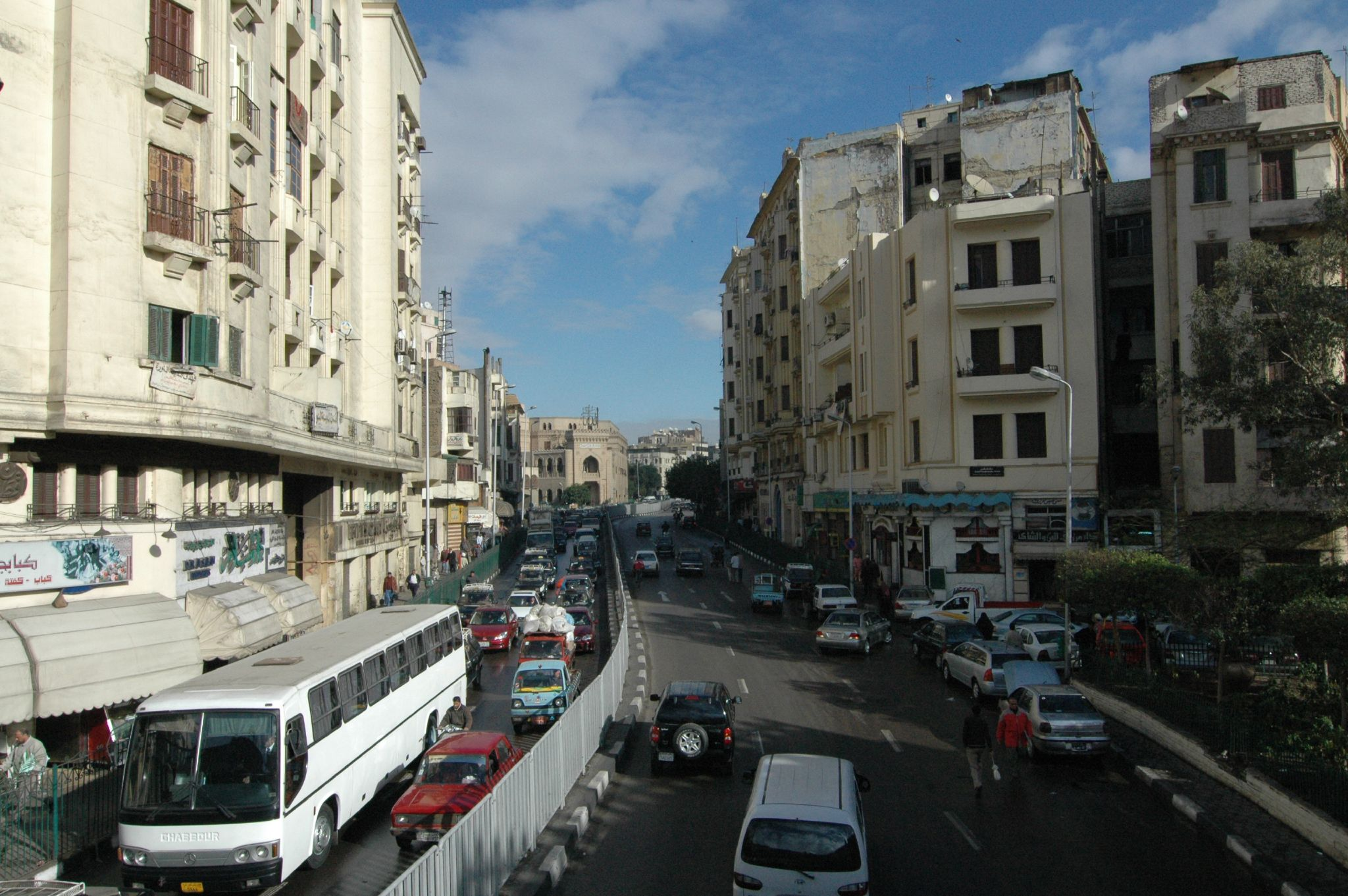 una delle strade più rumorose e trafficate del Cairo